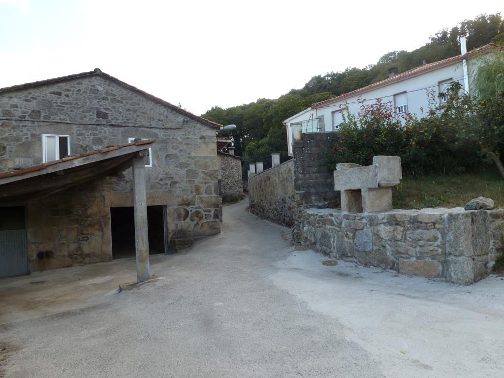 Lobelle de Arriba, parroquia de Lobelle, concello de Carballedo, Lugo